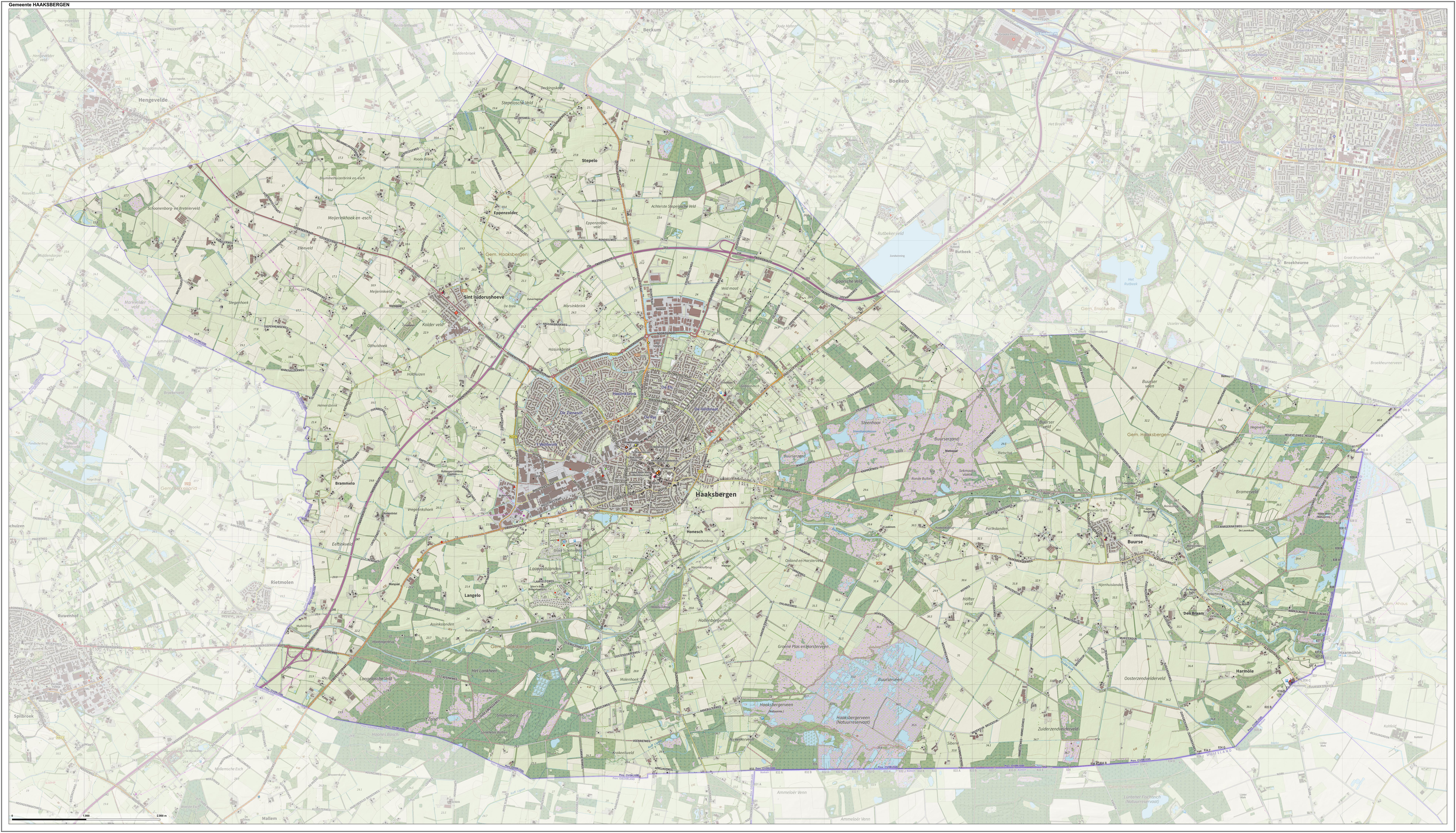 Topografische gemeentekaart. Resolutie: 400 pixels/km. Kaartbeeld samengesteld uit de open geodata van de Top10NL en Top25namen (Kadaster), Creative Commons-BY licentie. Gebouwvlakken uit open geodata BAG extract. Wegen uit de OpenStreetMap, OpenStreetMap community. Reliëfschaduw uit de Actuele Hoogtekaart AHN2. Samenstelling en kleurenschema: Jan-Willem van Aalst, met QGIS. Zie ook de Legenda.